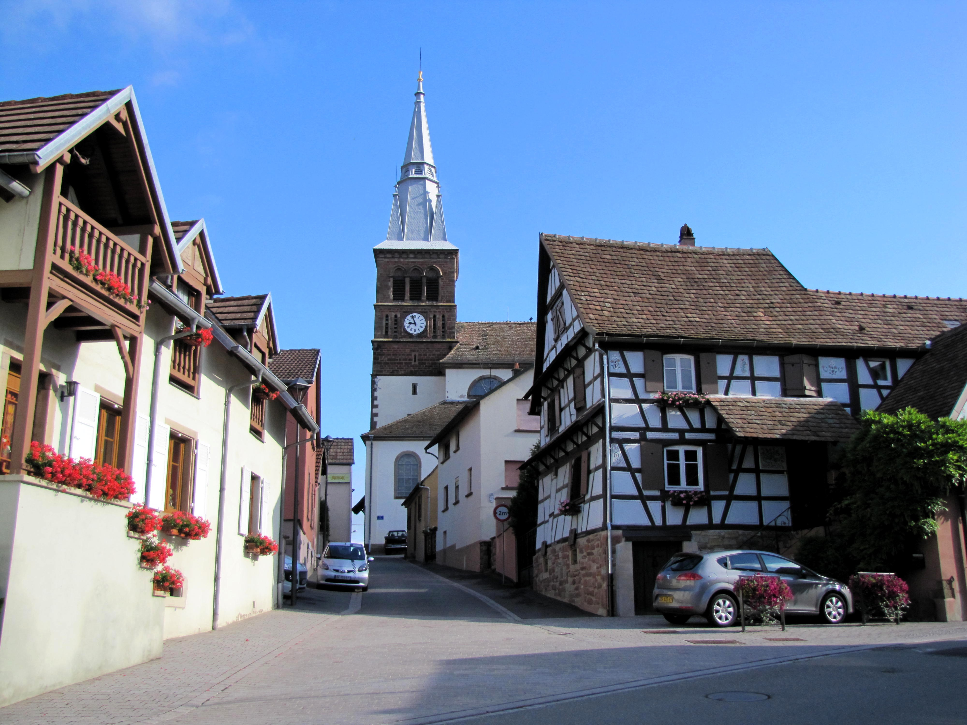 Alsace, Bas-Rhin, Église Saints-Pierre-et-Paul de Hochfelden (IA67009233). Rue de l'église.